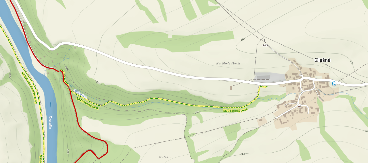 Naučná stezka Olešenský potok v obci Němčovice na Rokycansku na turistické mapě z Mapy.cz